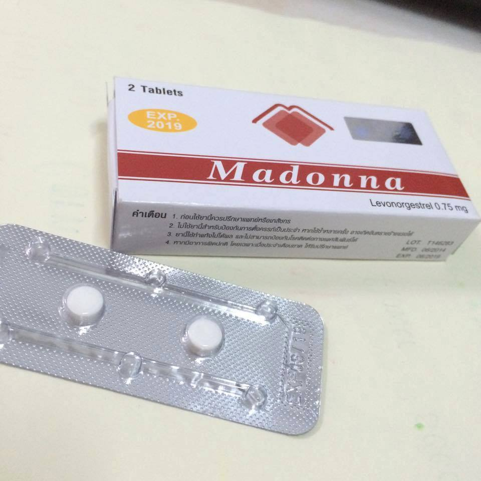 ส่วนประกอบใน 1 กล่อง ของกล่องยาคุม